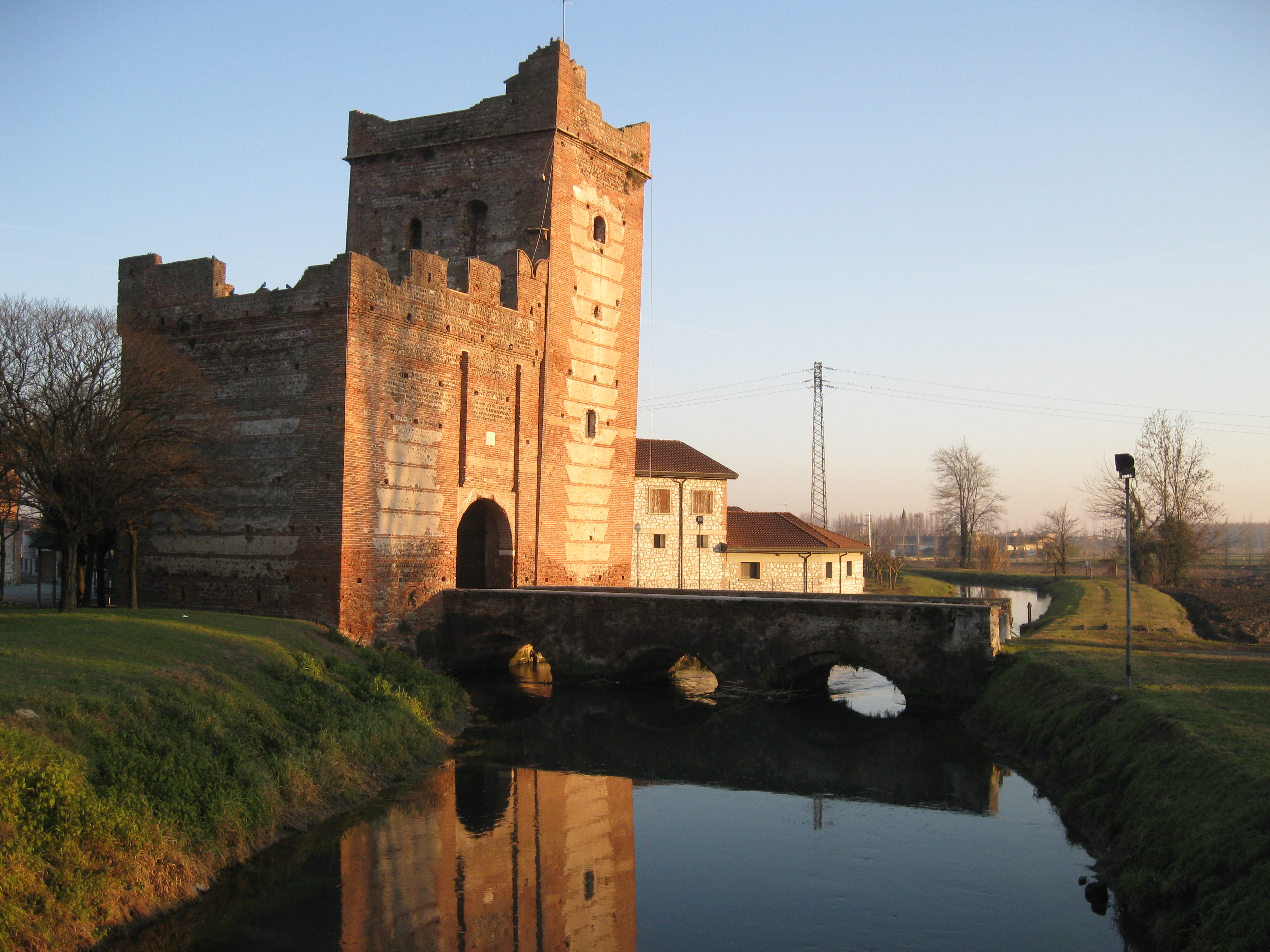 Torre Scaligera, Isola della Scala, Italien